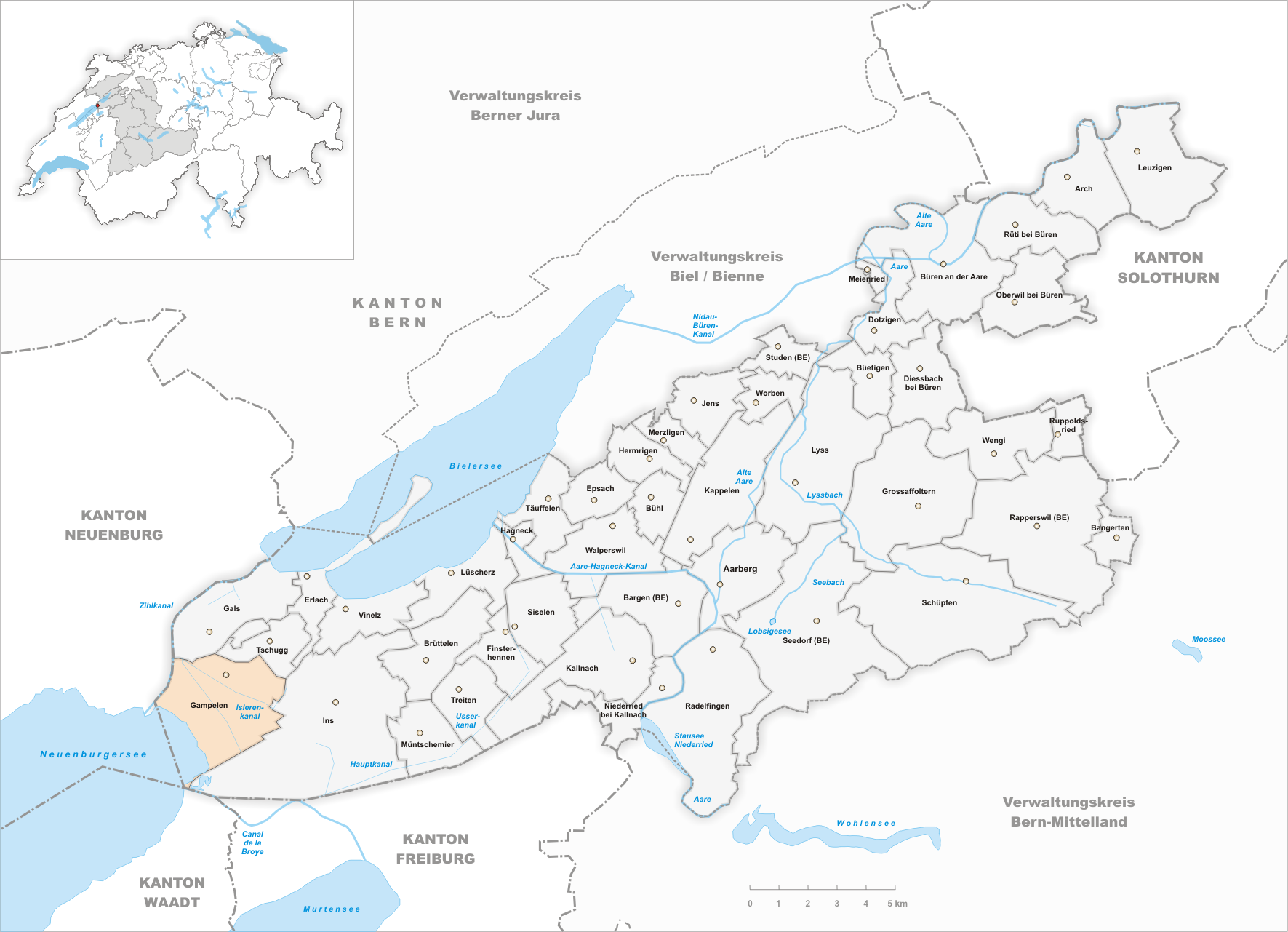 Municipality Gampelen